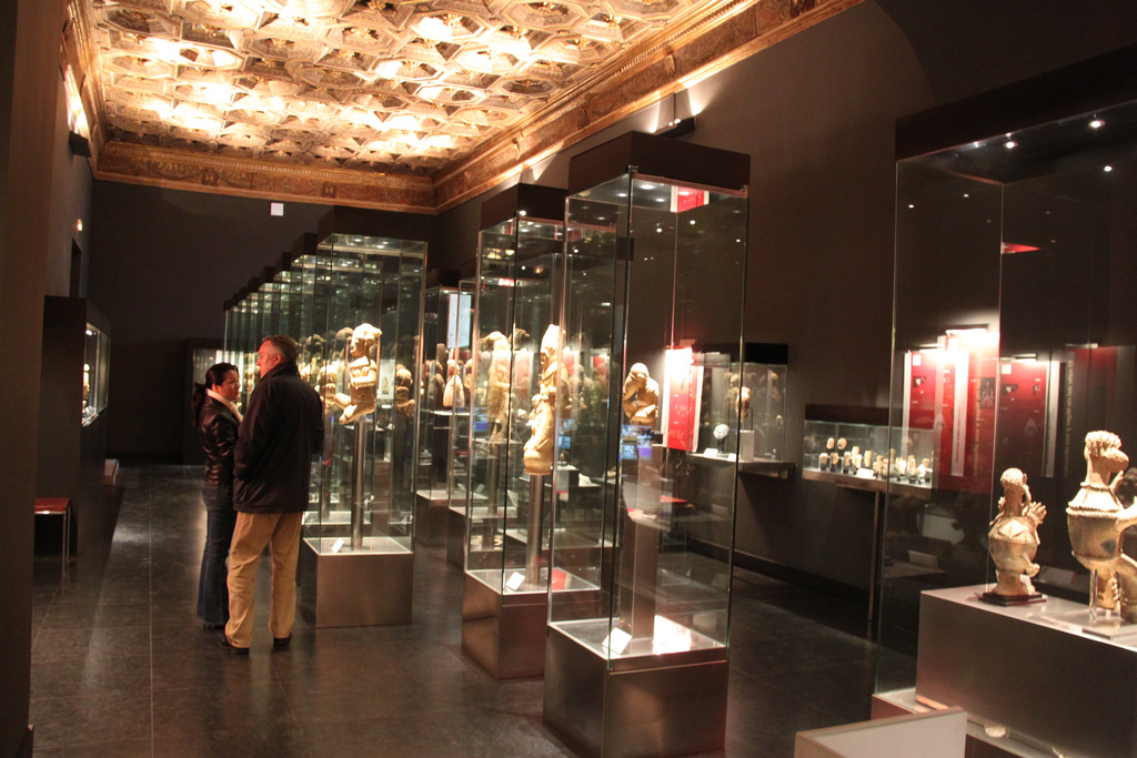 Imagen de la Sala Renacimiento situada en el interior Palacio de Santa Cruz de Valladolid, donde se expone parte de la colección de terracotas africanas de la Fundación Alberto Jiménez-Arellano Alonso